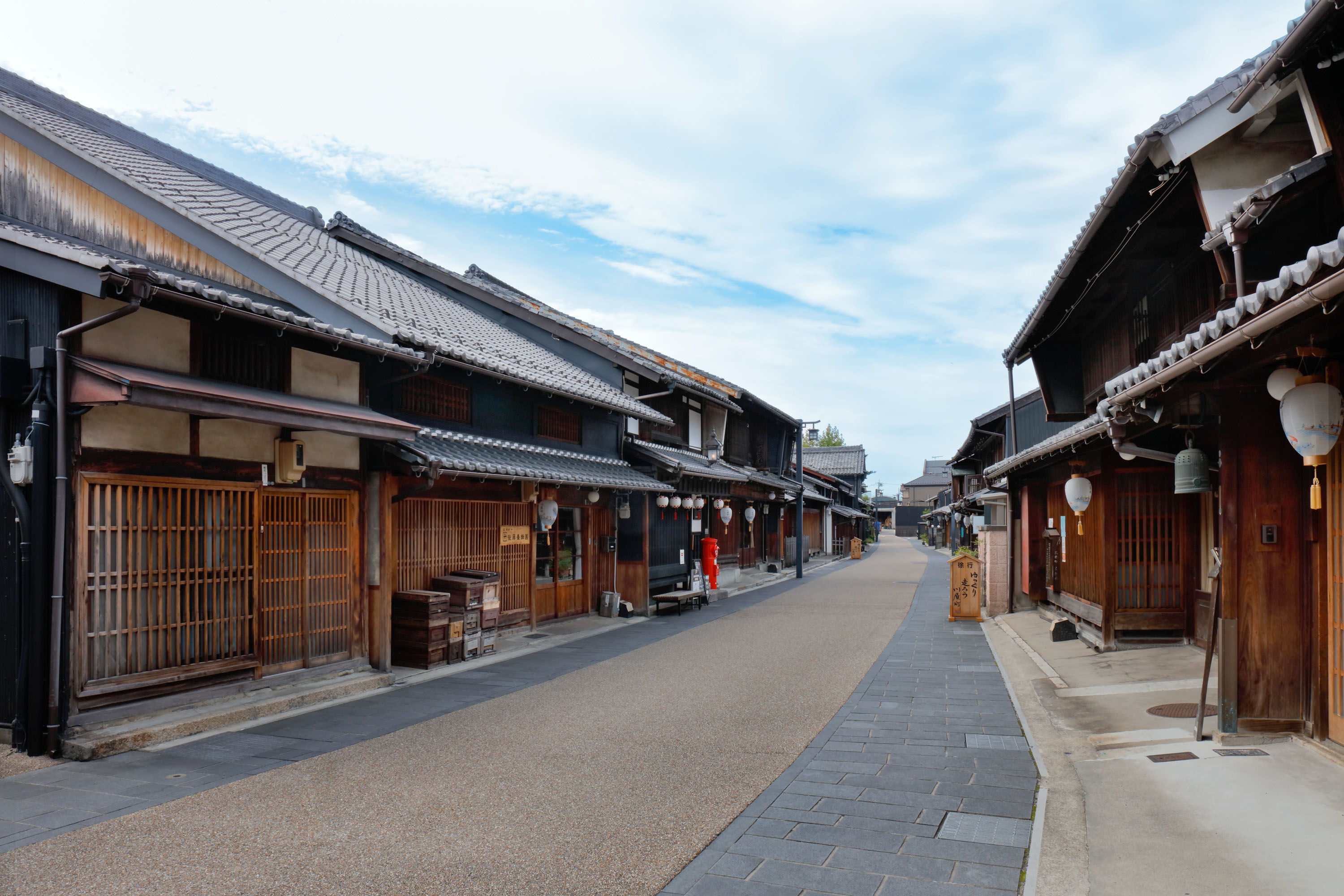 川原町 (岐阜市)-目抜き通り